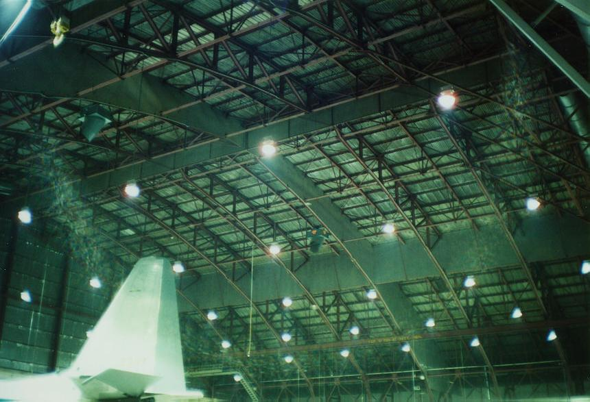 see below